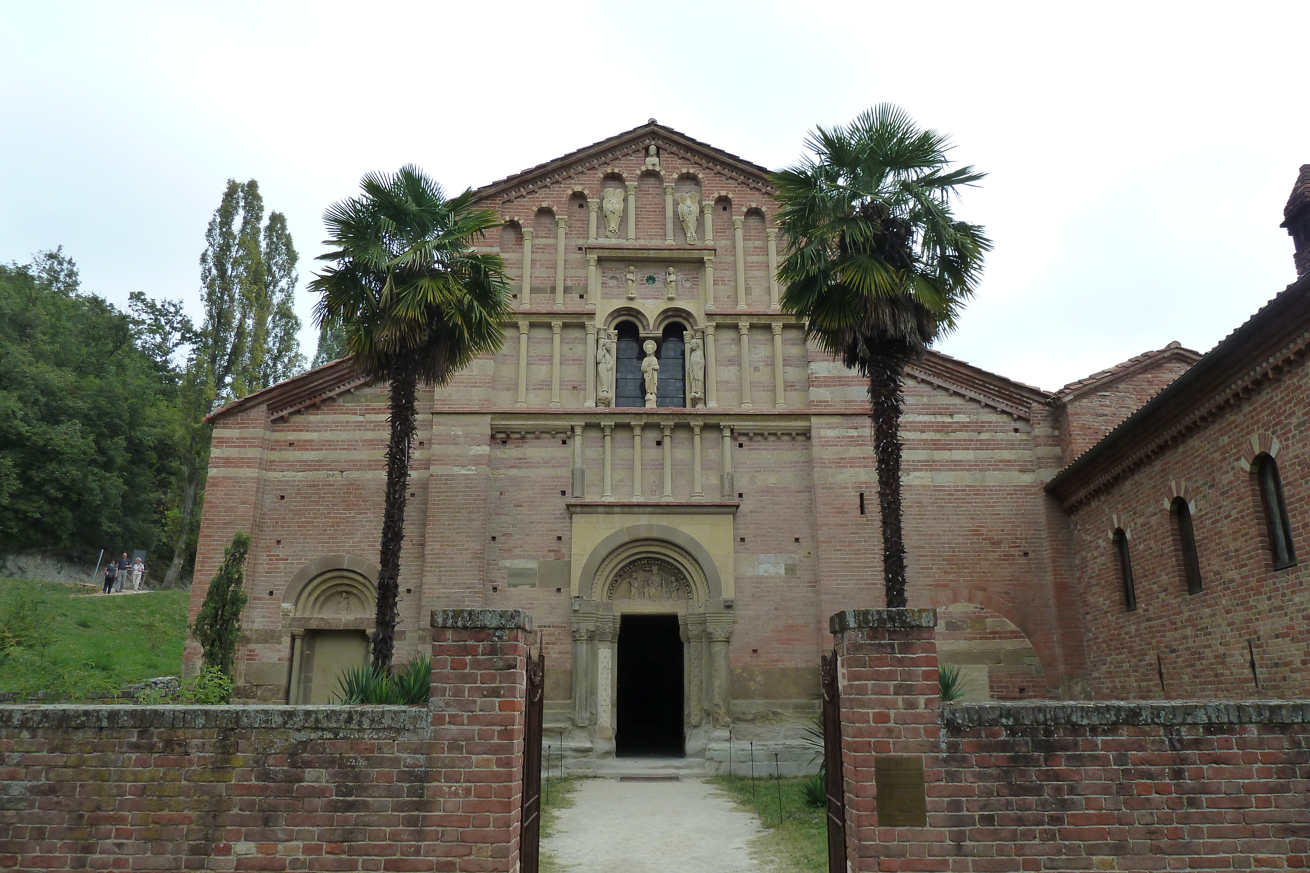 Abtei Vezzolano-Albugnano